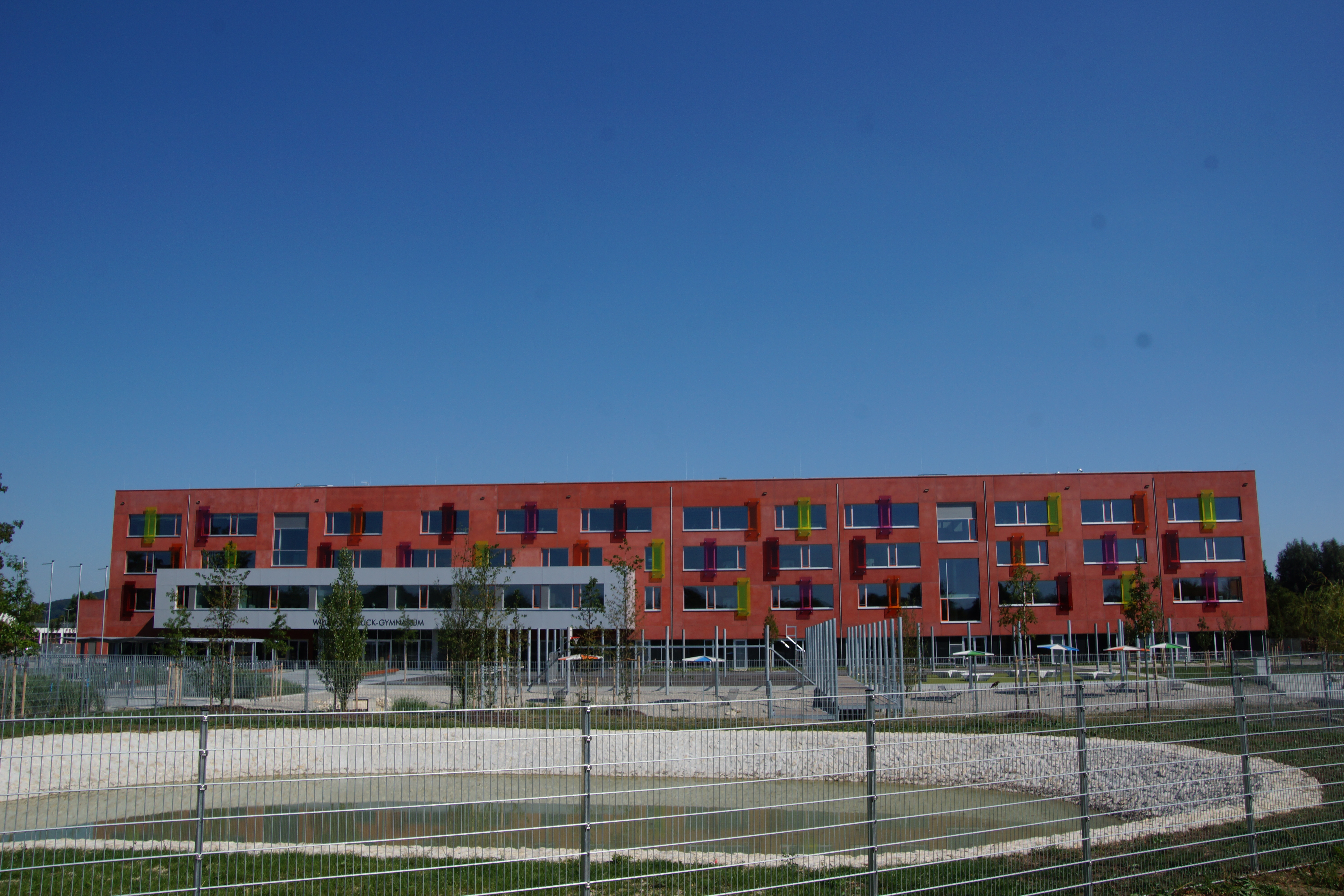 Der Neubau des Willibald-Gluck-Gymnasiums in Neumarkt an der Woffenbacher Straße